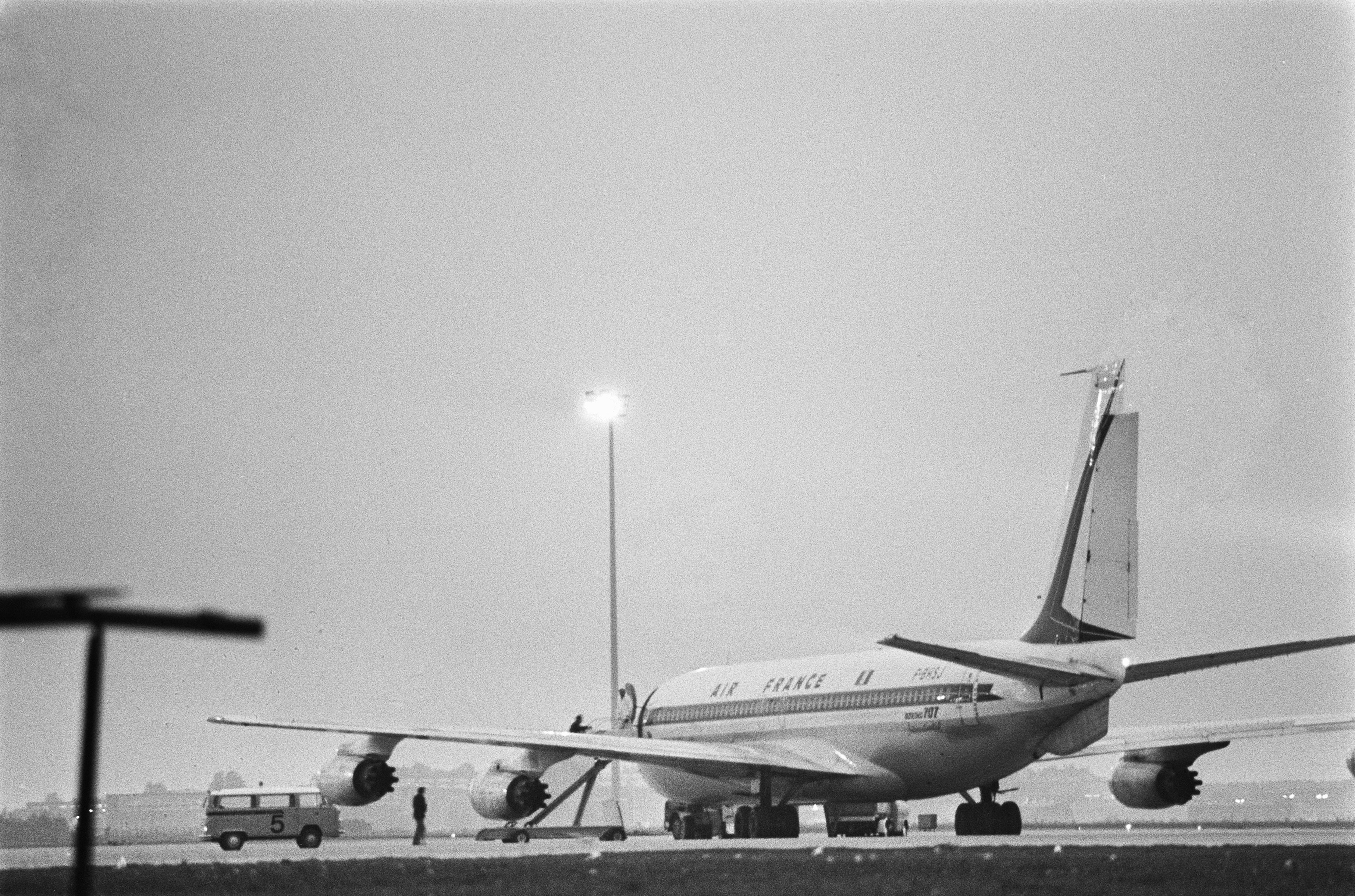 Gijzelingsdrama Schiphol; de boeing 707 tijdens de overdracht van de gijzelaars